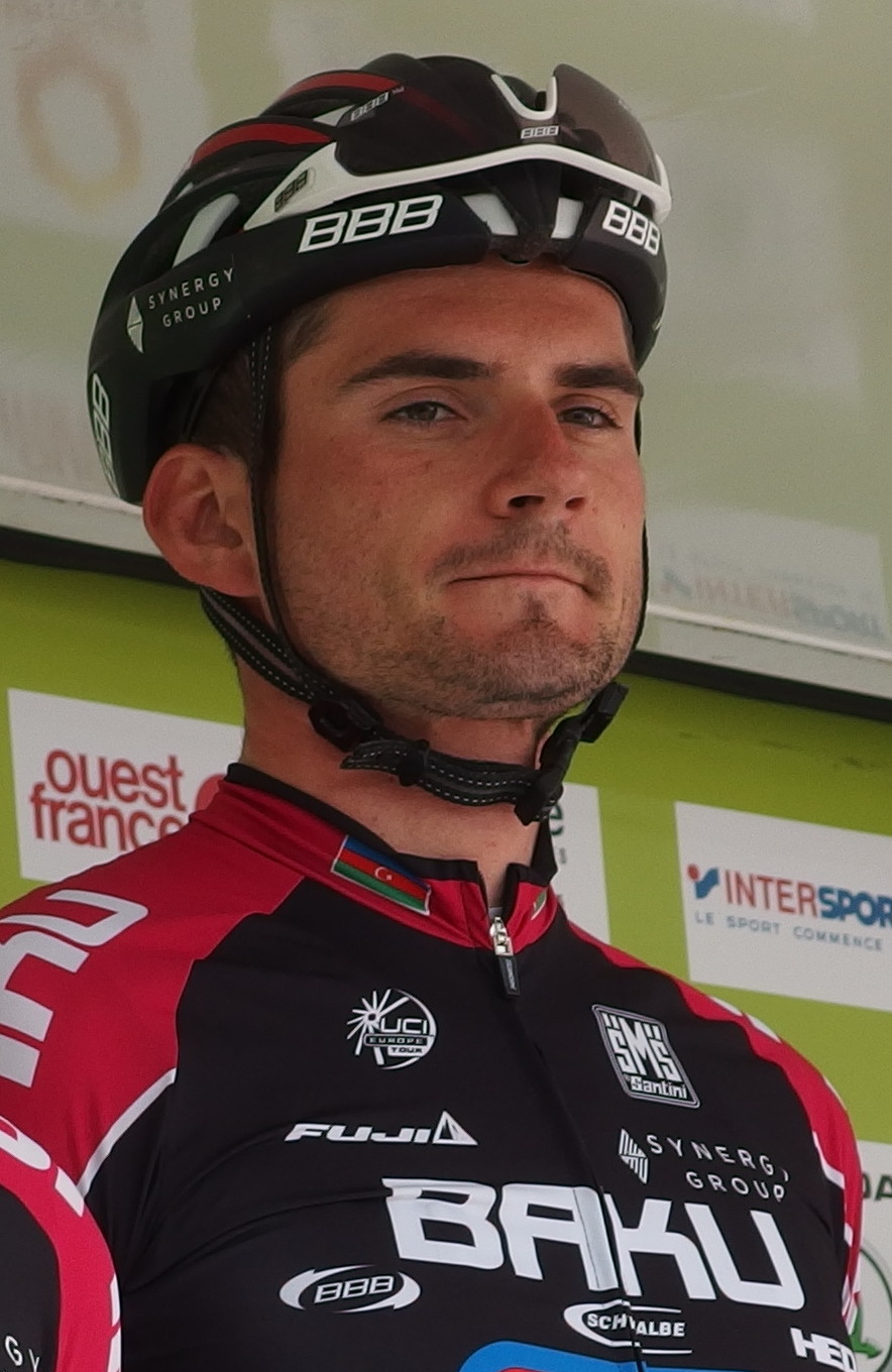 Tour de Bretagne 2014 - Présentation des équipes au départ de la sixième étape à Radenac - Équipe Synergy Baku Project Depicted person: Maksym Averin